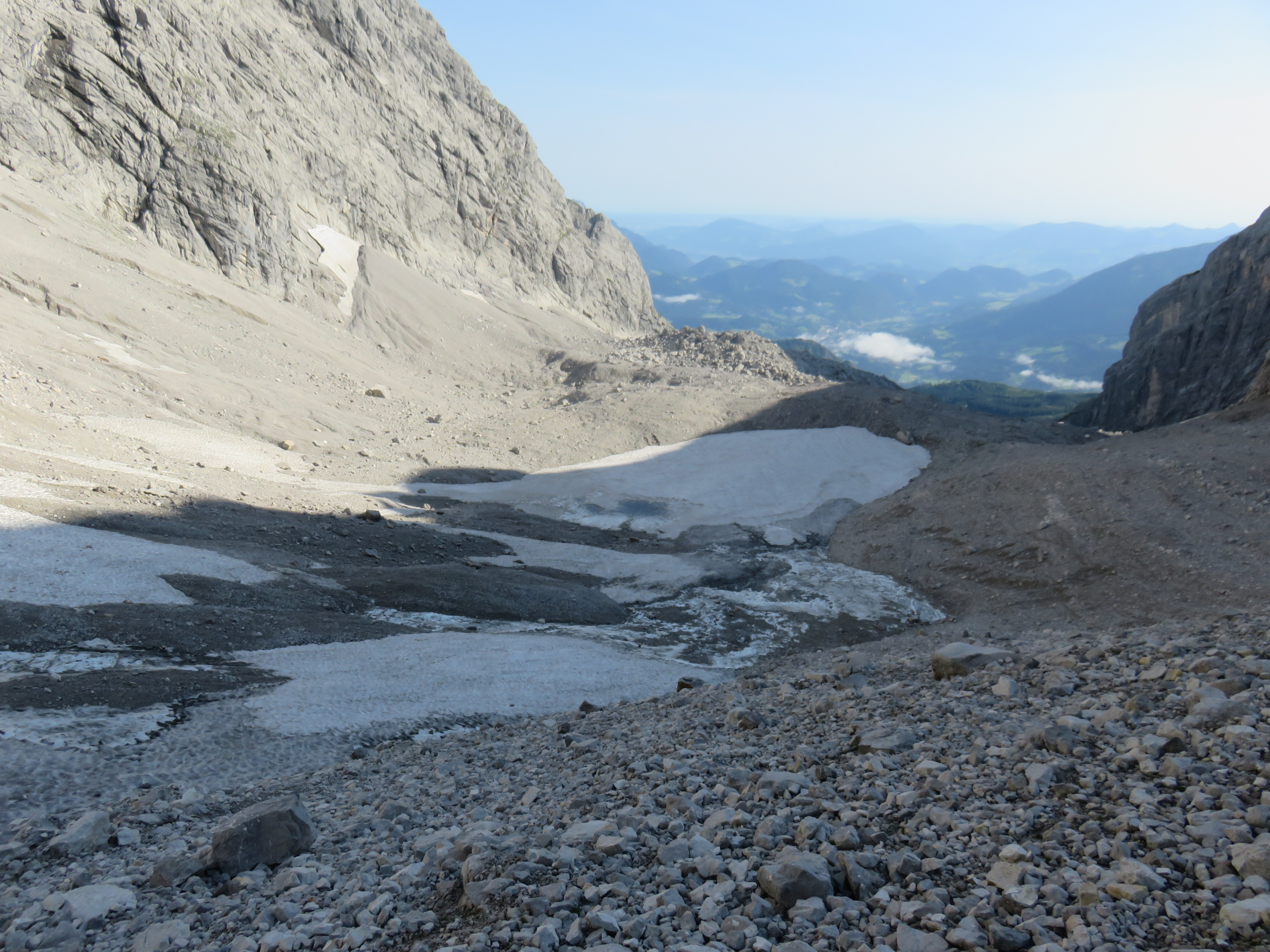 Watzmanngletscher